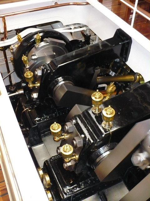 Bodensee-Dampfschiff Hohentwiel Dampfmaschine